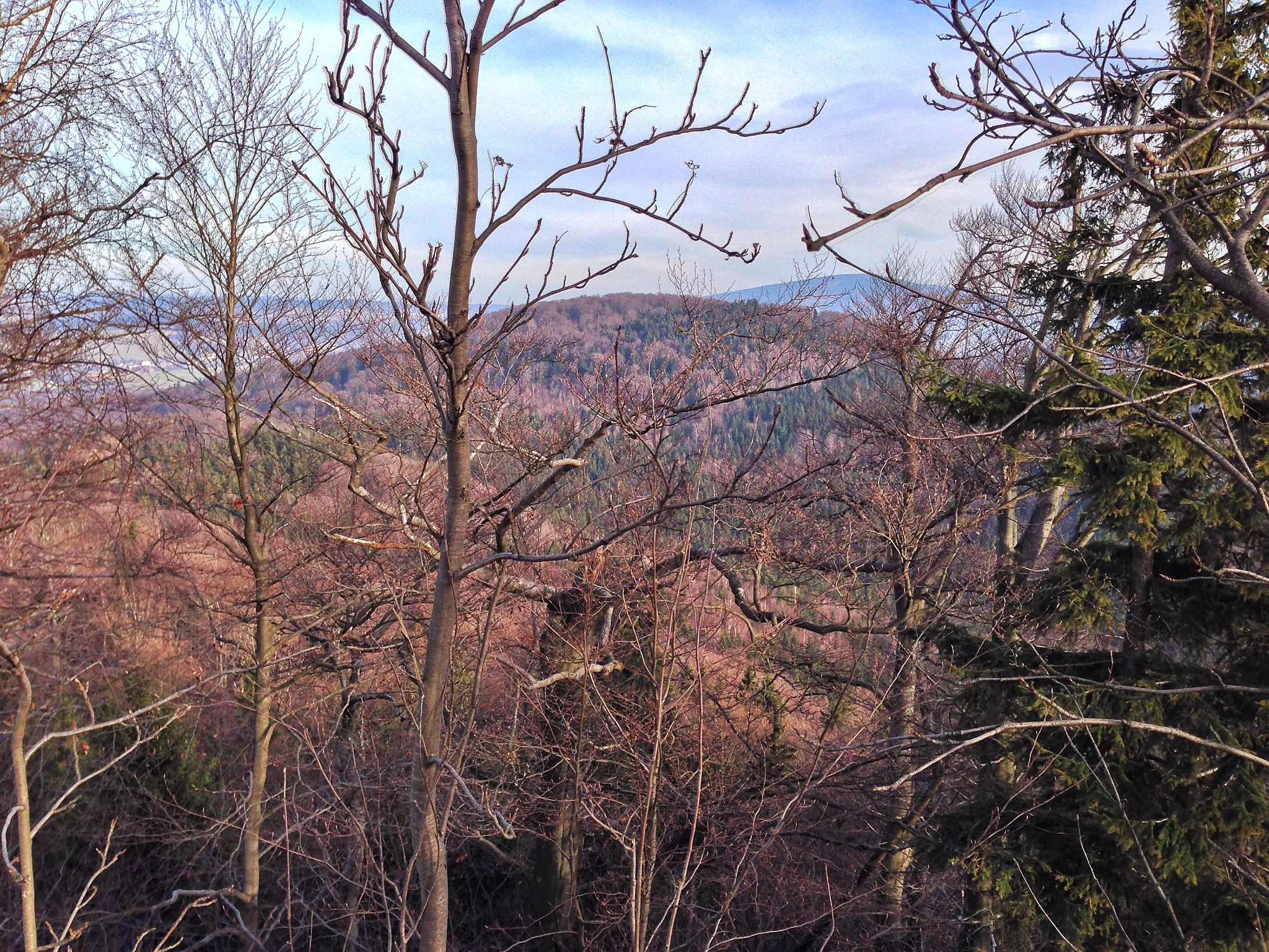 Stržový vrch (710 m) v Jizerských horách z Oldřichovského Špičáku (724 m)